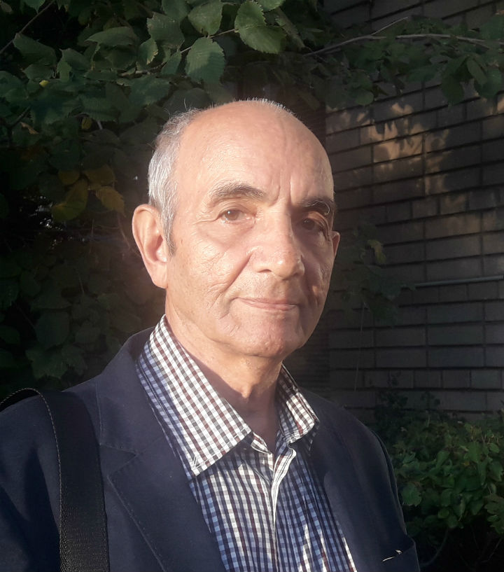 Абдулла Хаба на крыльце Библиотеки иностранной литературы в Москве. 14.09.2018.